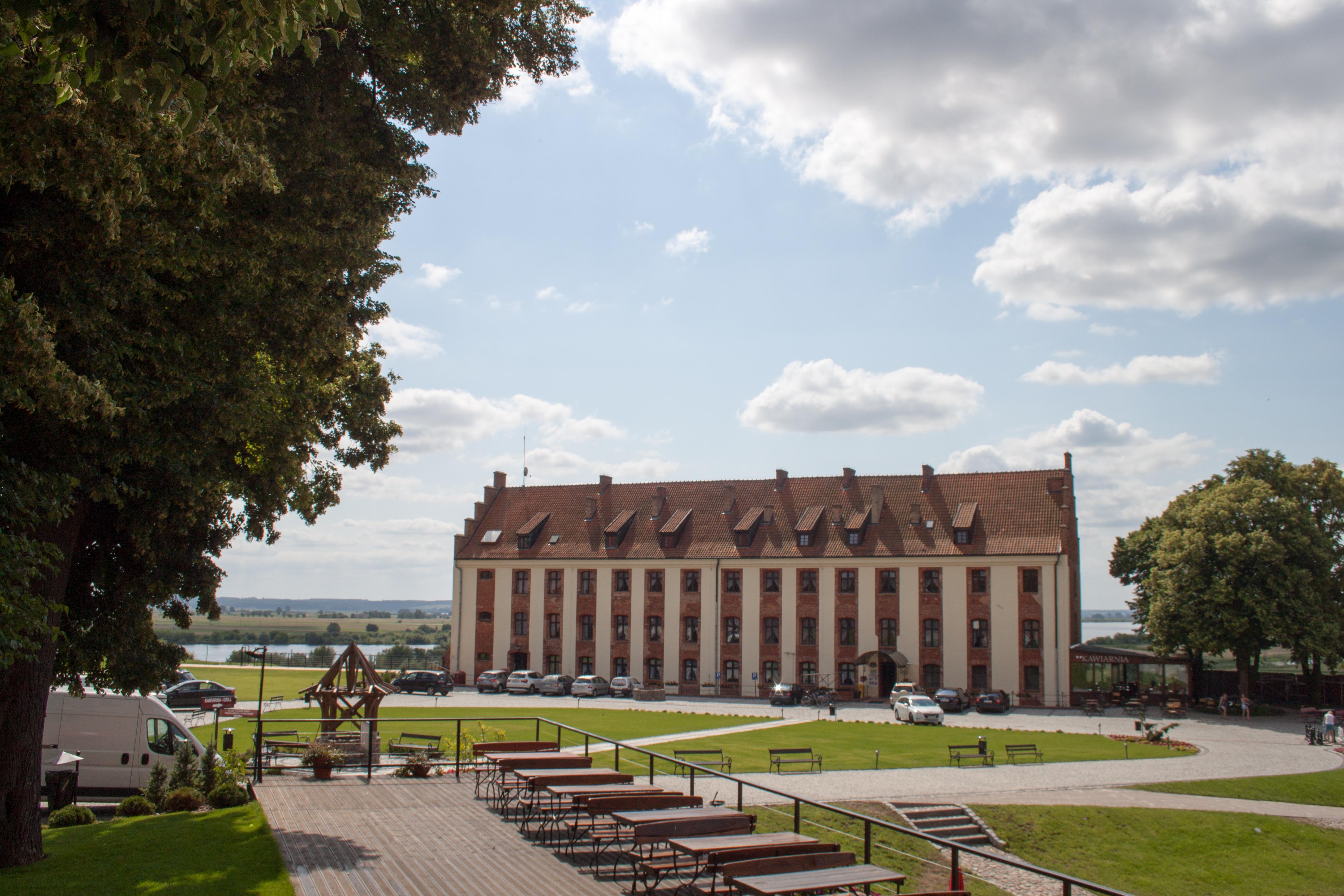 Palace Marysienki from Gniew Castle